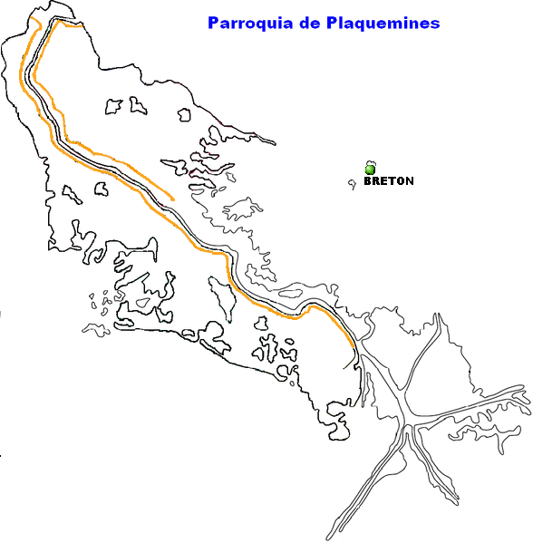 Breton Settlement, Louisiana